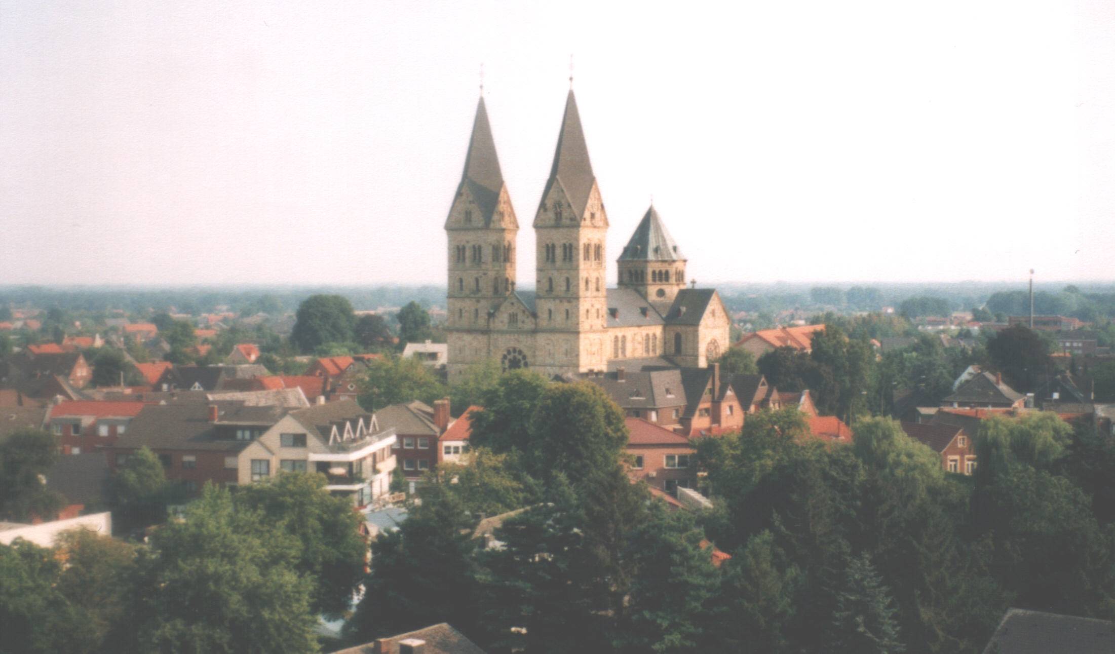 Neuenkirchen, Ansicht aus einem Riesenrad